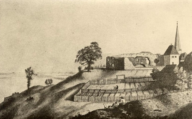 Vaade Tukumsi linnusevaremetele kagust 1795 a. H. F. Wäberi joonistus.